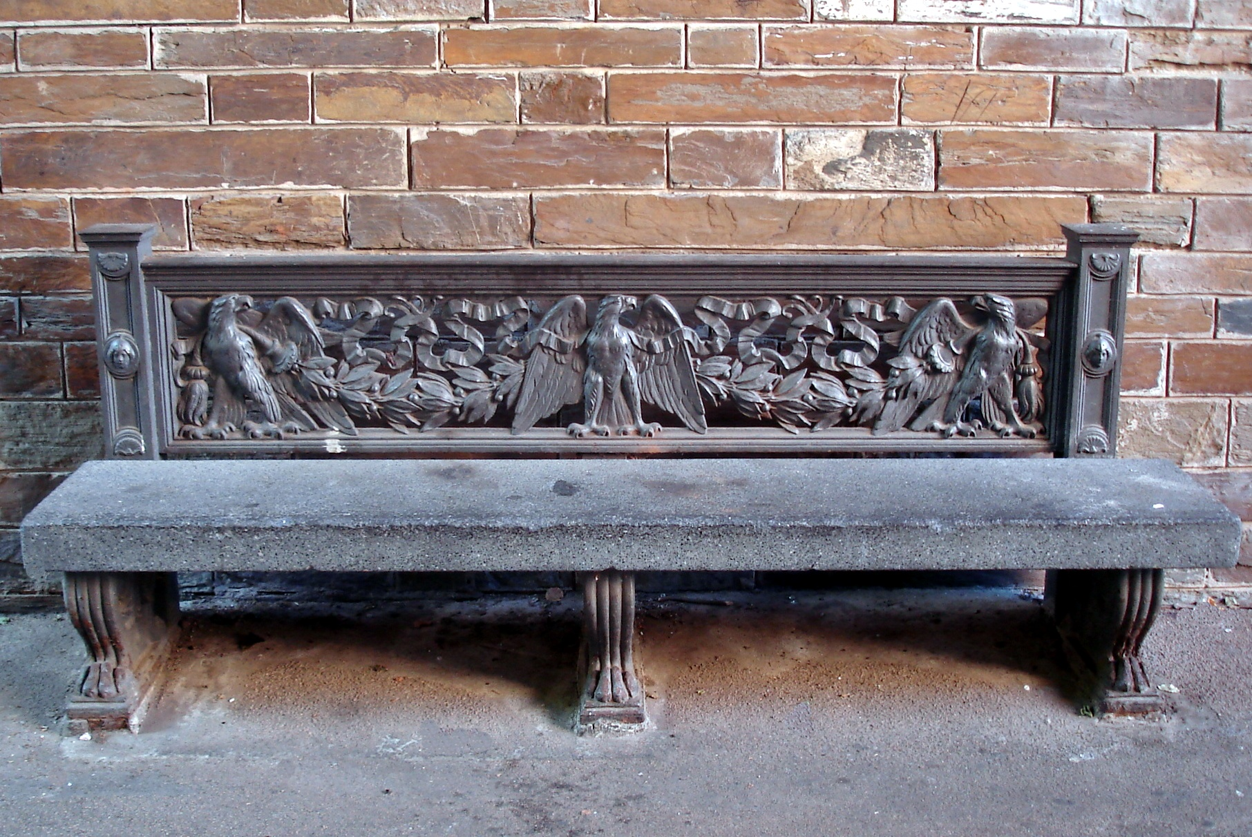 Bancă fotografiată în Germania în 2008